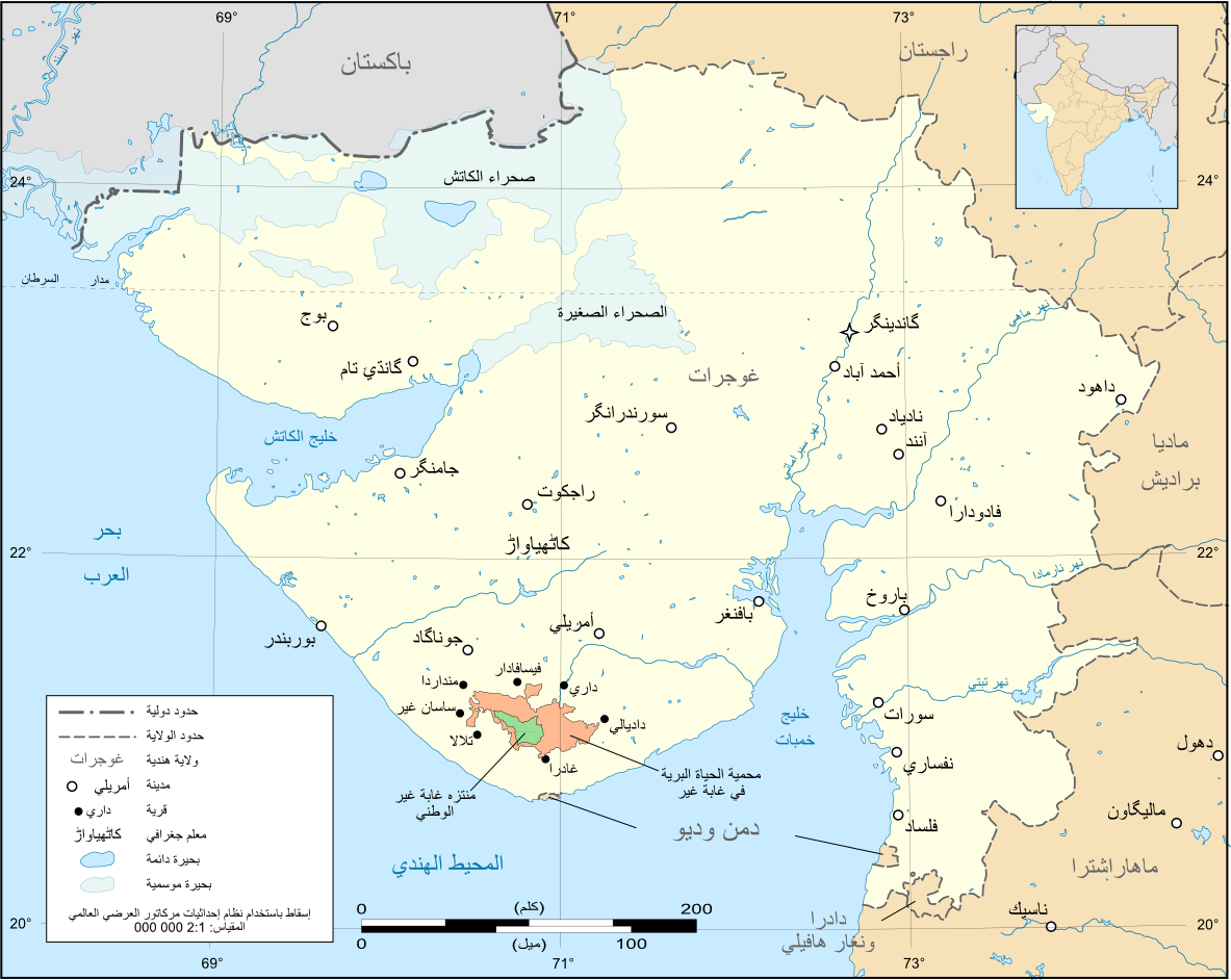 خارطة ولاية غوجرات الهندية باللغة العربية، ويظهر فيها منتزه غابة غير الوطني للحياة البرية.